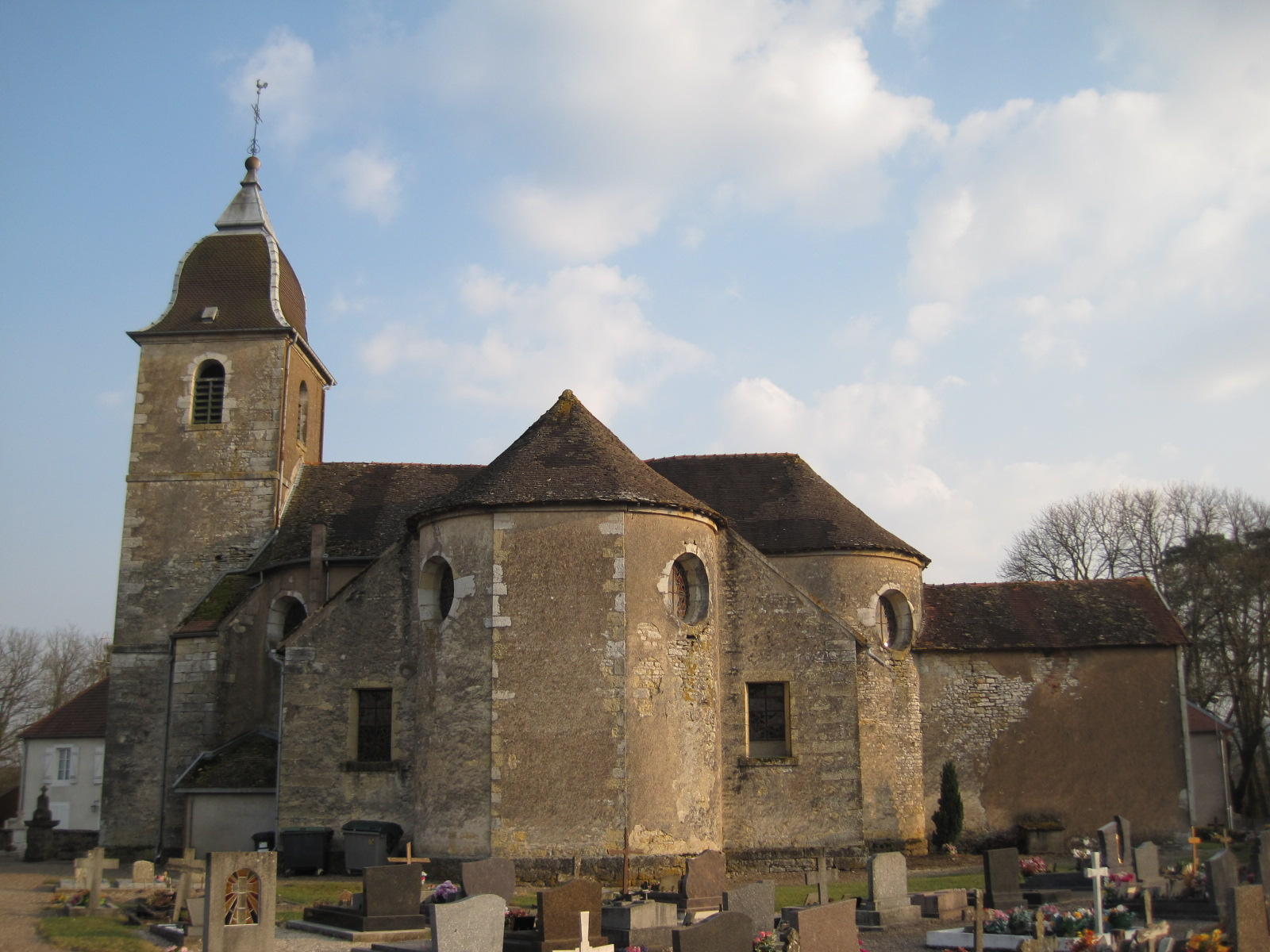 Eglise Saint-Maurice de Cirey-les-Bellevaux